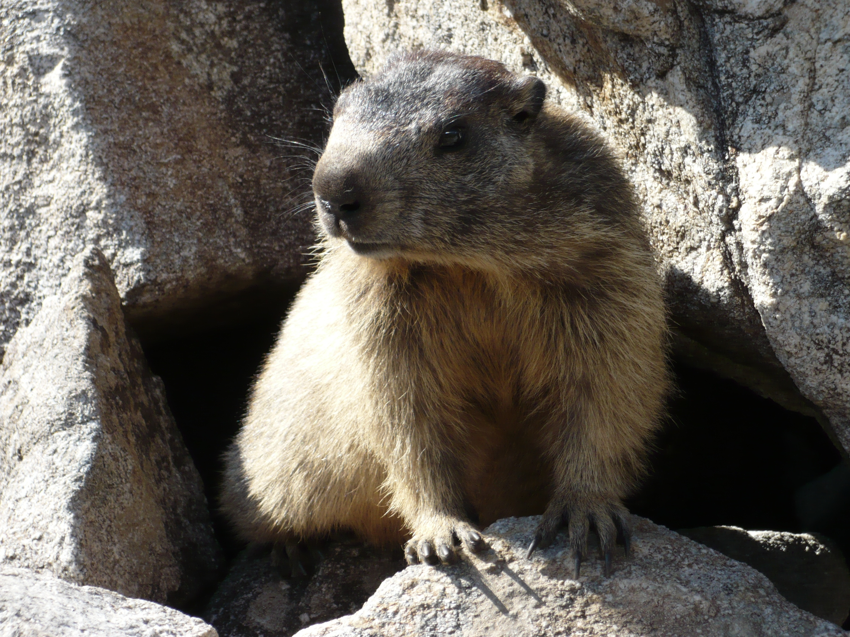 Marmotte du Lac Lauvitel, Par Pierre Poulard - photographie tout droits réservés